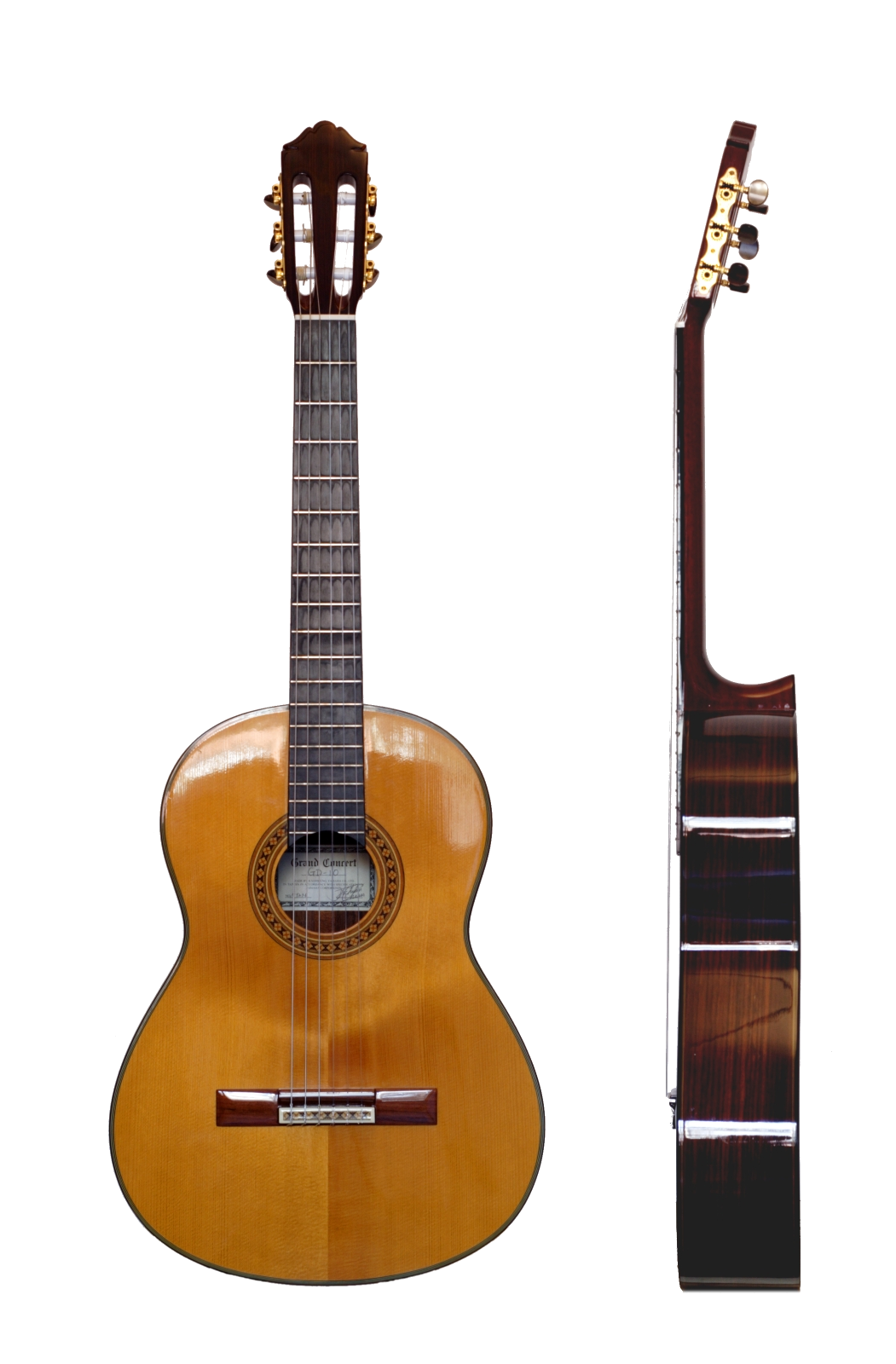 Классическая гитара.